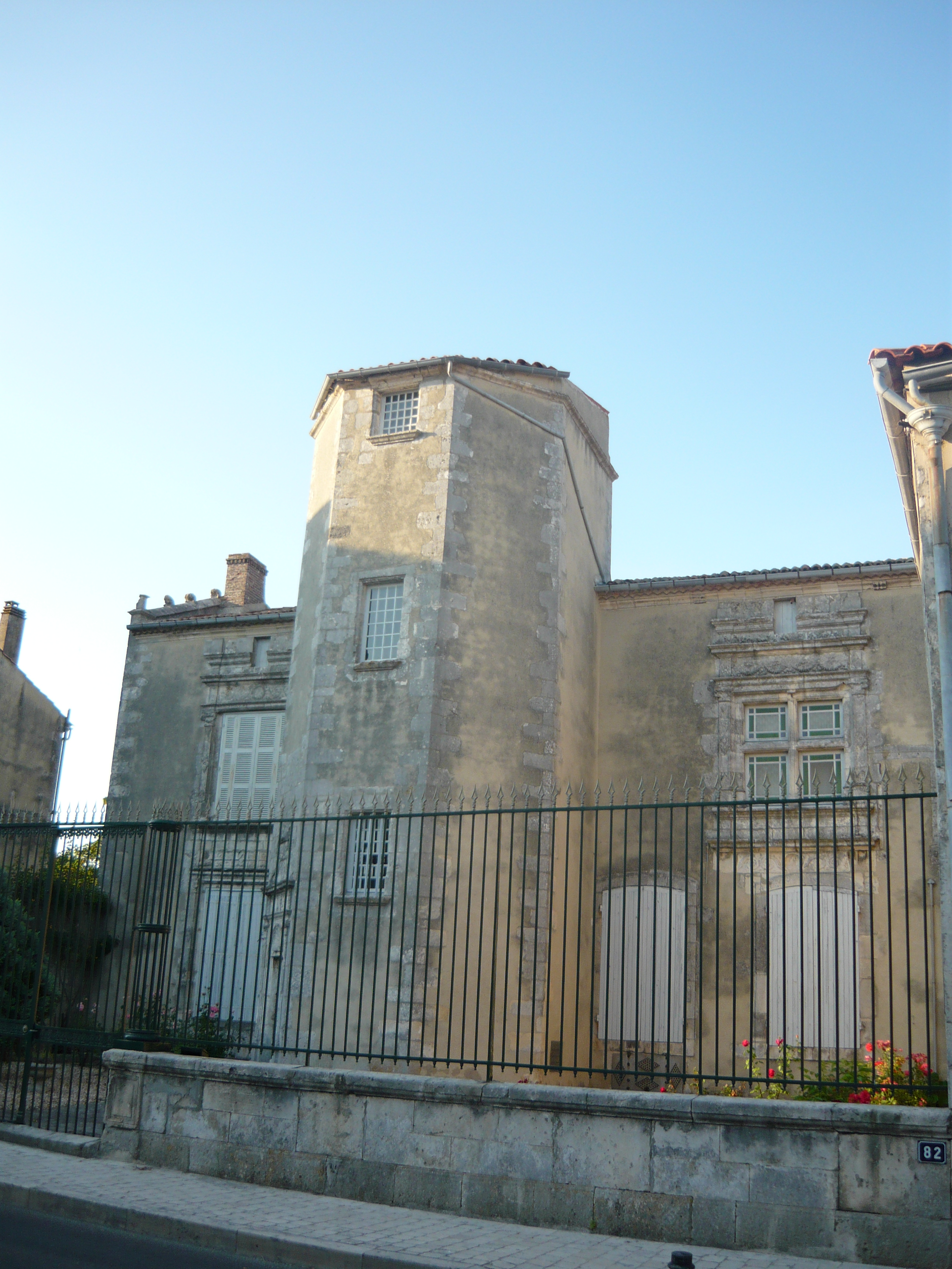 L'unique maison de style Renaissance à Marennes dans le centre ville (17).